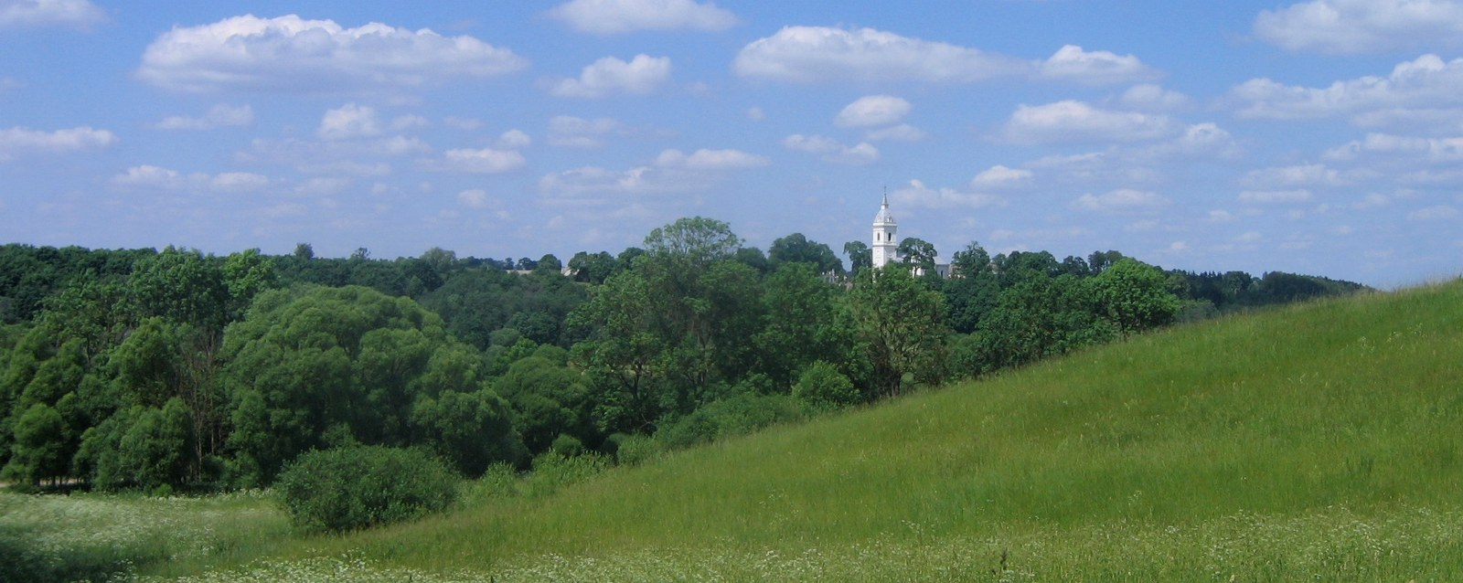 Autoriaus nuotrauka, 2006.06.24. Lėvens slėnis ir Palėvenės bažnyčia - nuo kairiojo Lėvens kranto.